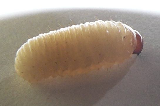 probably Curculio nucum (Belgium)